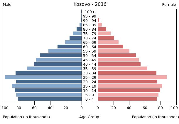 A population pyramid illustrates the age and sex structure of a country's population and may provide insights about political and social stability, as well as economic development. The population is distributed along the horizontal axis, with males shown on the left and females on the right. The male and female populations are broken down into 5-year age groups represented as horizontal bars along the vertical axis, with the youngest age groups at the bottom and the oldest at the top. The shape of the population pyramid gradually evolves over time based on fertility, mortality, and international migration trends.